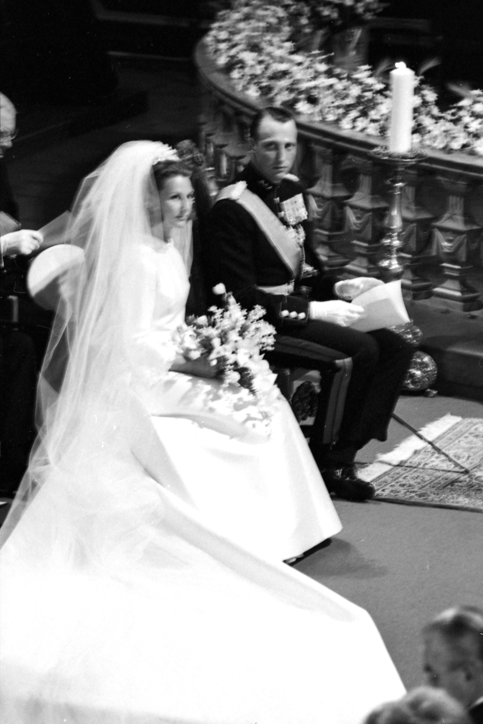 Vielse av kronprins Harald og Sonja Haraldsen i Oslo Domkirke.